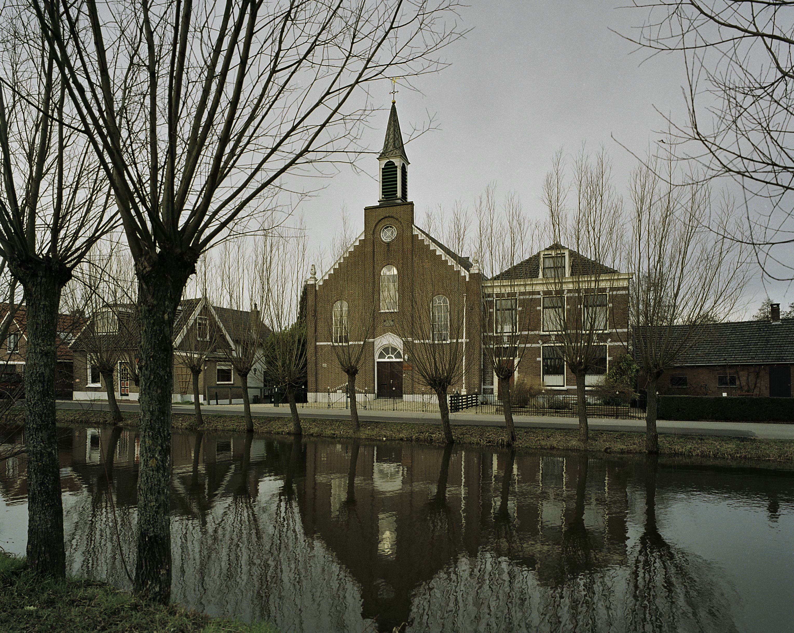 Gereformeerde Kerk of Eben Haëzerkerk: Overzicht westgevel vanaf overzijde van het water (opmerking: Gefotografeerd voor Monumenten In Nederland Zuid-Holland)